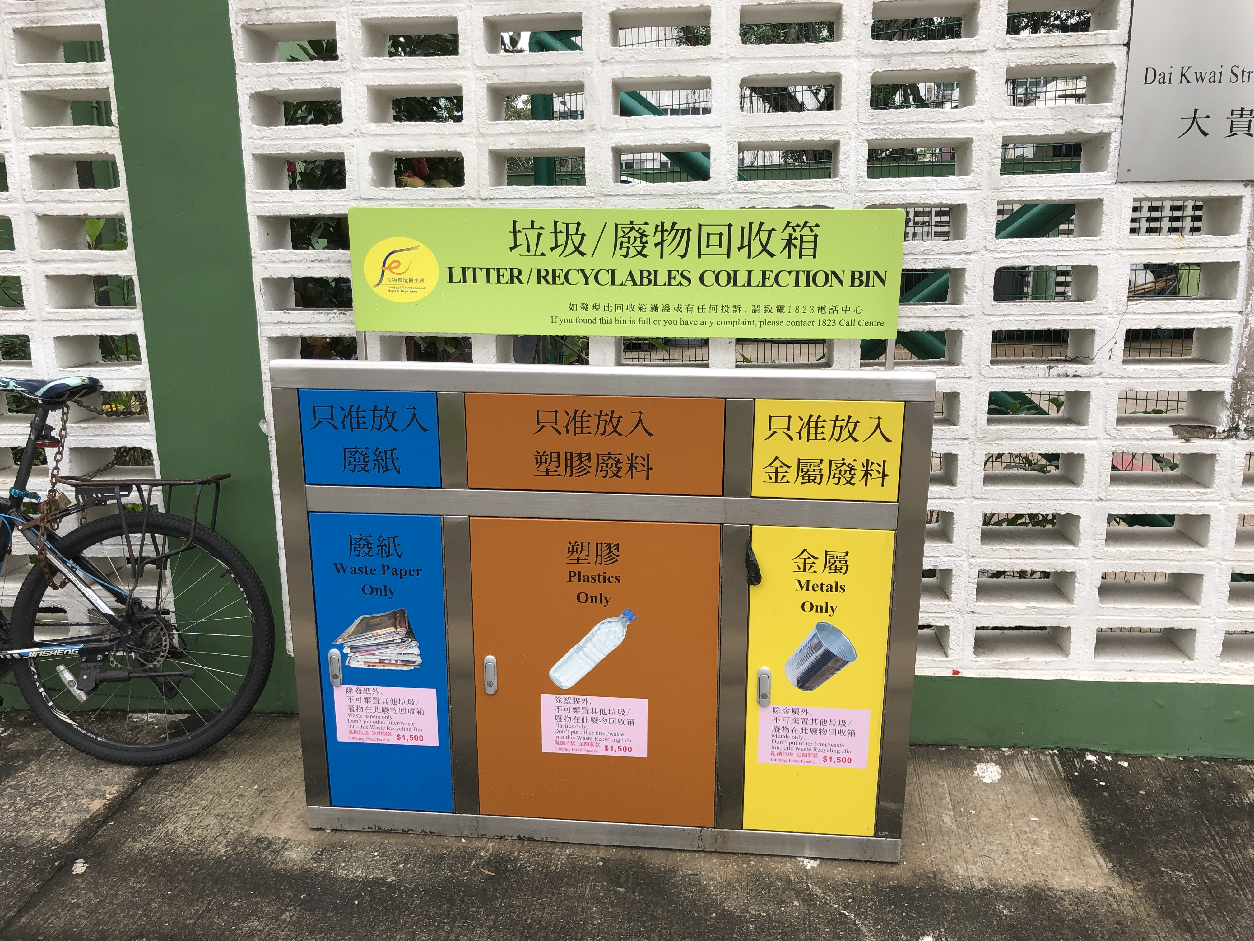 中文（香港）: 香港三色回收箱食物環境衞生署